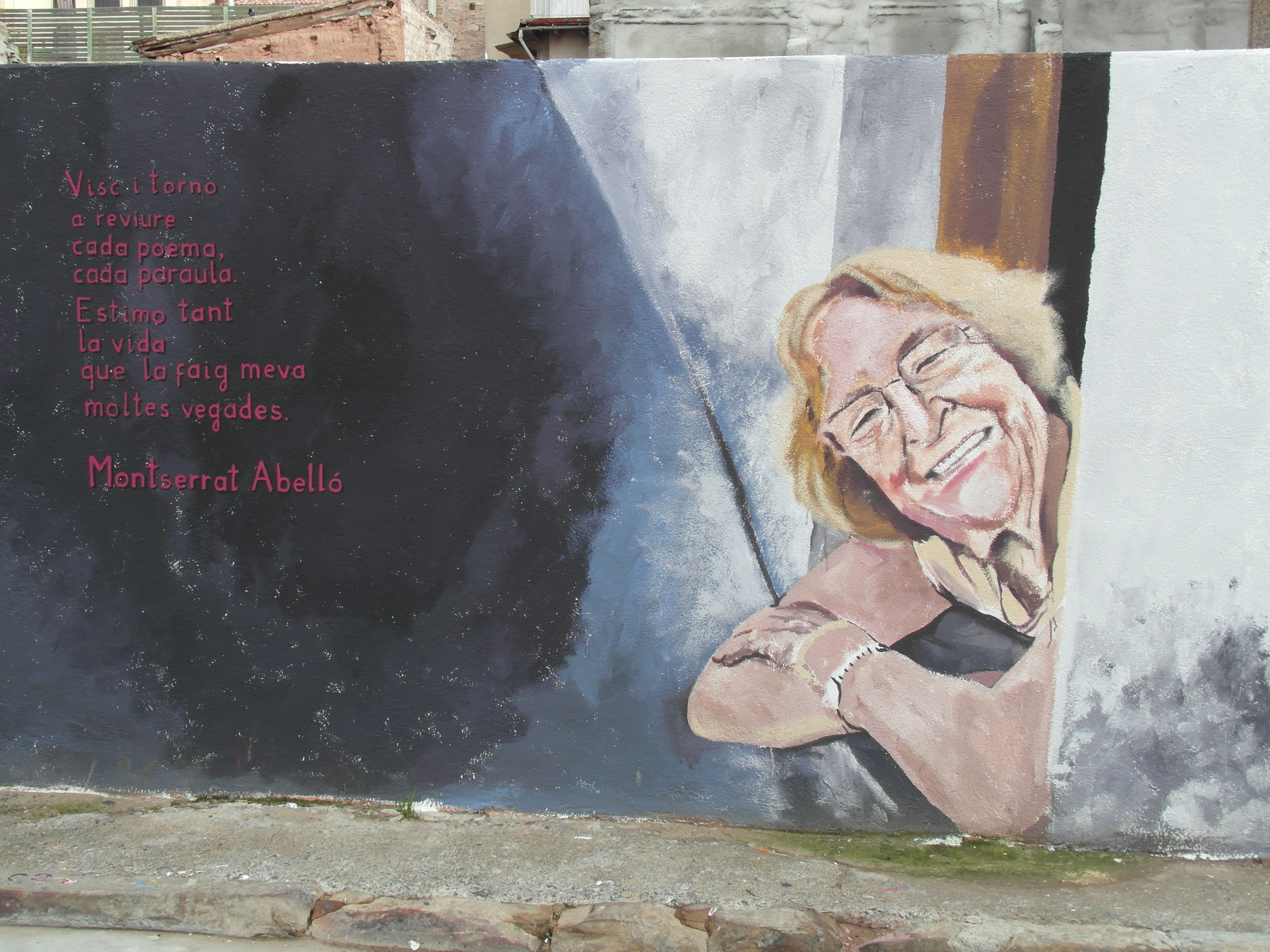 Mural al carrer Camp d'Urgell de Manresa de Montserrat Abelló.